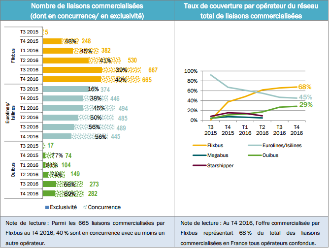 Ce graphique montre le nombre de ligne sur lesquelles sont présents Flixbus, Ouibus et Isilines.